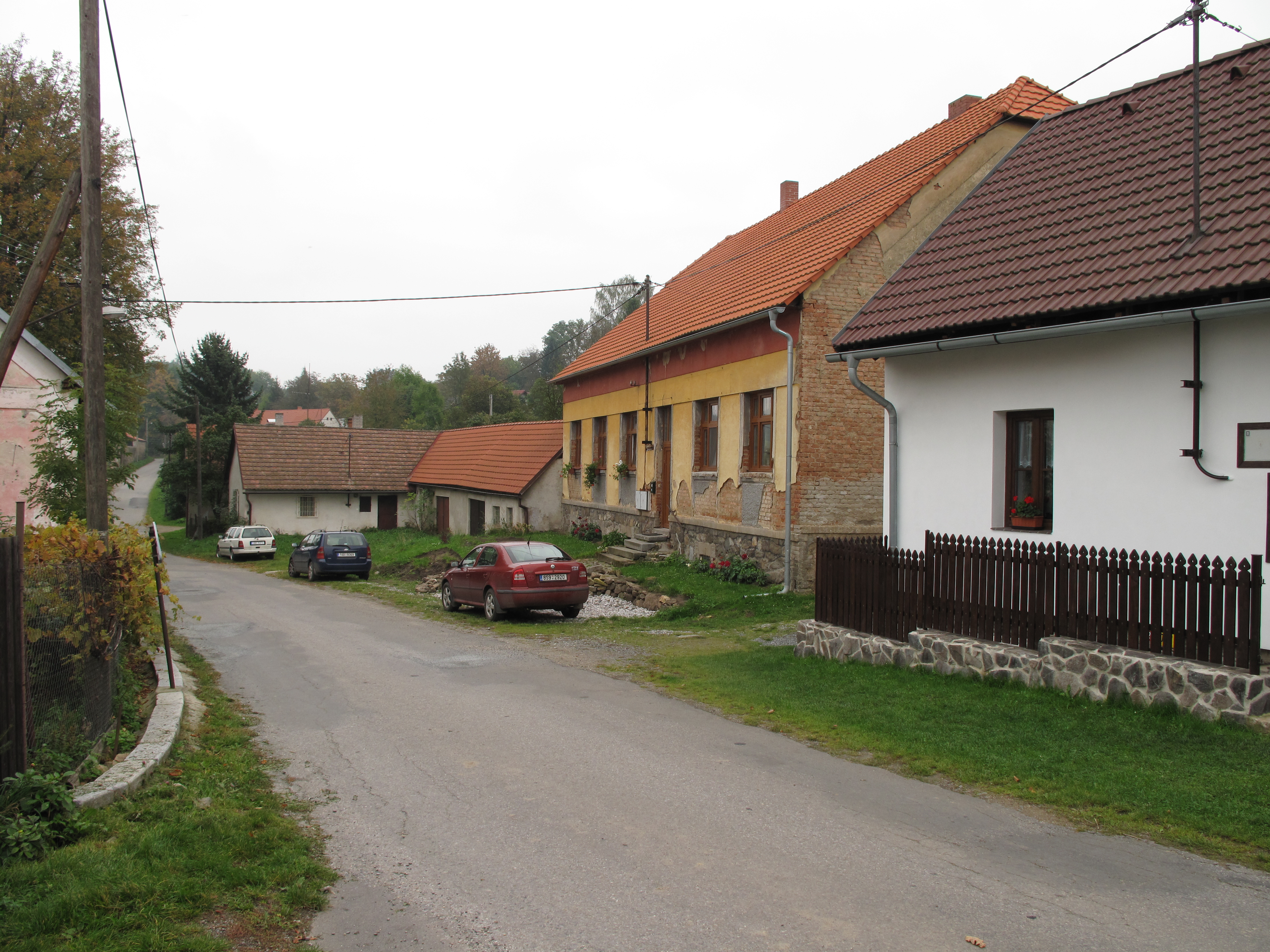 Domy u silnice v Jiříně. Okres Benešov, Česká republika.